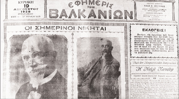 Първа страница на вестник "Ефимерис тон Валканион", 19 август 1928 година.